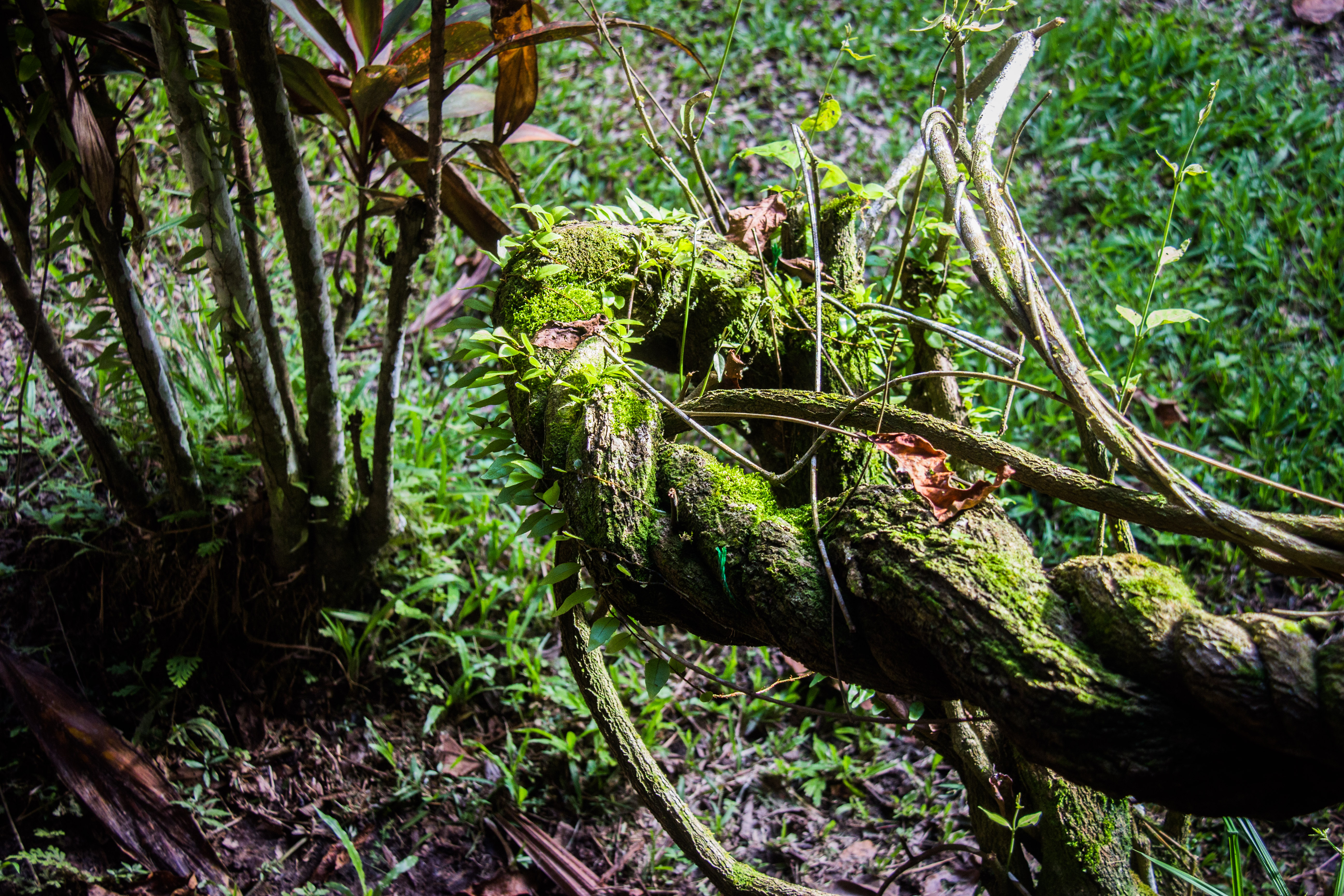 La enredadera de ayahuasca (Banisteriopsis caapi) en Iquitos, Perú.